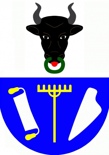 znak, Koroužné, okres Žďár nad Sázavou